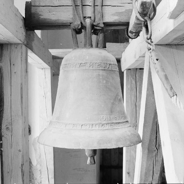 Lillklockan, medeltida. Kategori: (10) KlockorLillklockan, medeltida.